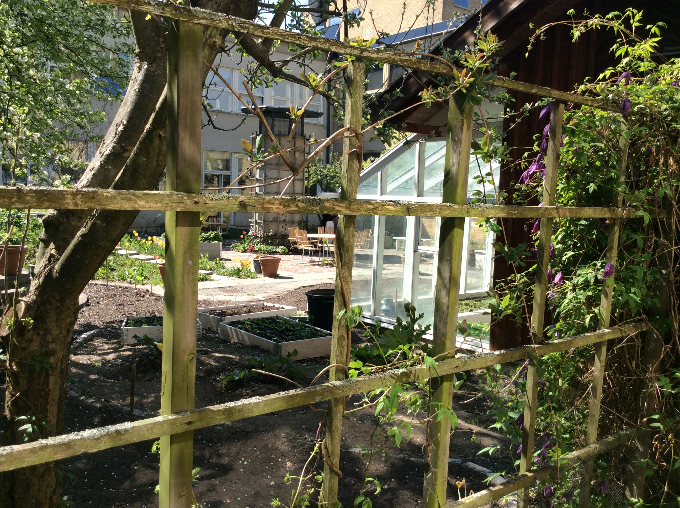 Eriksdalsskolans egna innergård